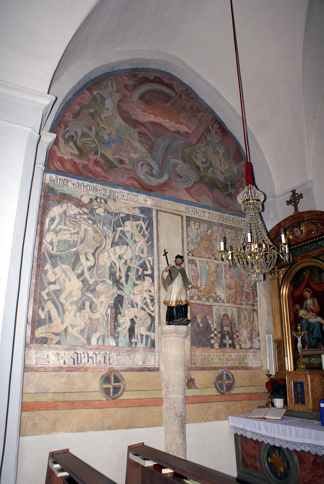 Nordwand der Taborkirche